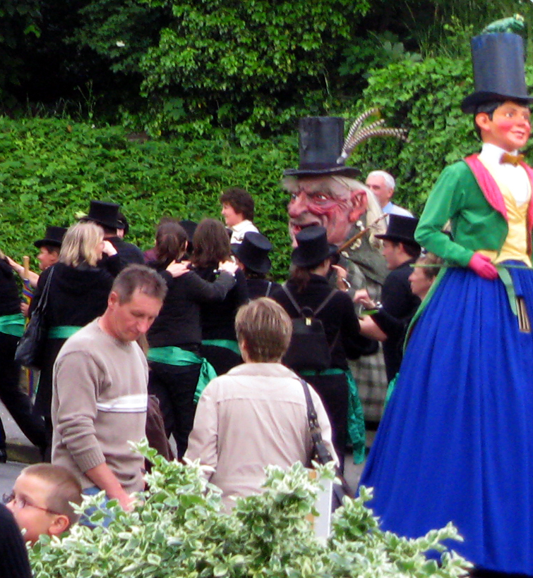 Ham (Somme, France) - Animation festive au centre-ville, un dimanche de printemps. Le (petit) géant L'Affreux Luquet a descendu la rue du Château et se trouve à l'angle de la rue de Noyon (avec le géant Anatole, plus grand mais moins monstrueux). « Anatole », en redingote verte à revers rouge/rose, est coiffé d'un haut-de-forme sur lequel est posée une grenouille. « L'Affreux Luquet », à peine plus grand que la taille humaine normale, a une silhouette plus ronde. Son visage de vieillard grimaçant est effrayant et démesuré. Ce personnage (plus mobile que les "vrais" géants) a fonction de gentiment faire peur au public, en secouant au bout d'un bâton un animal empaillé (écureuil ? furet ?), avec lequel il frôle le visage de certains spectateurs. Il porte un chapeau haut-de-forme décoré de longues plumes.